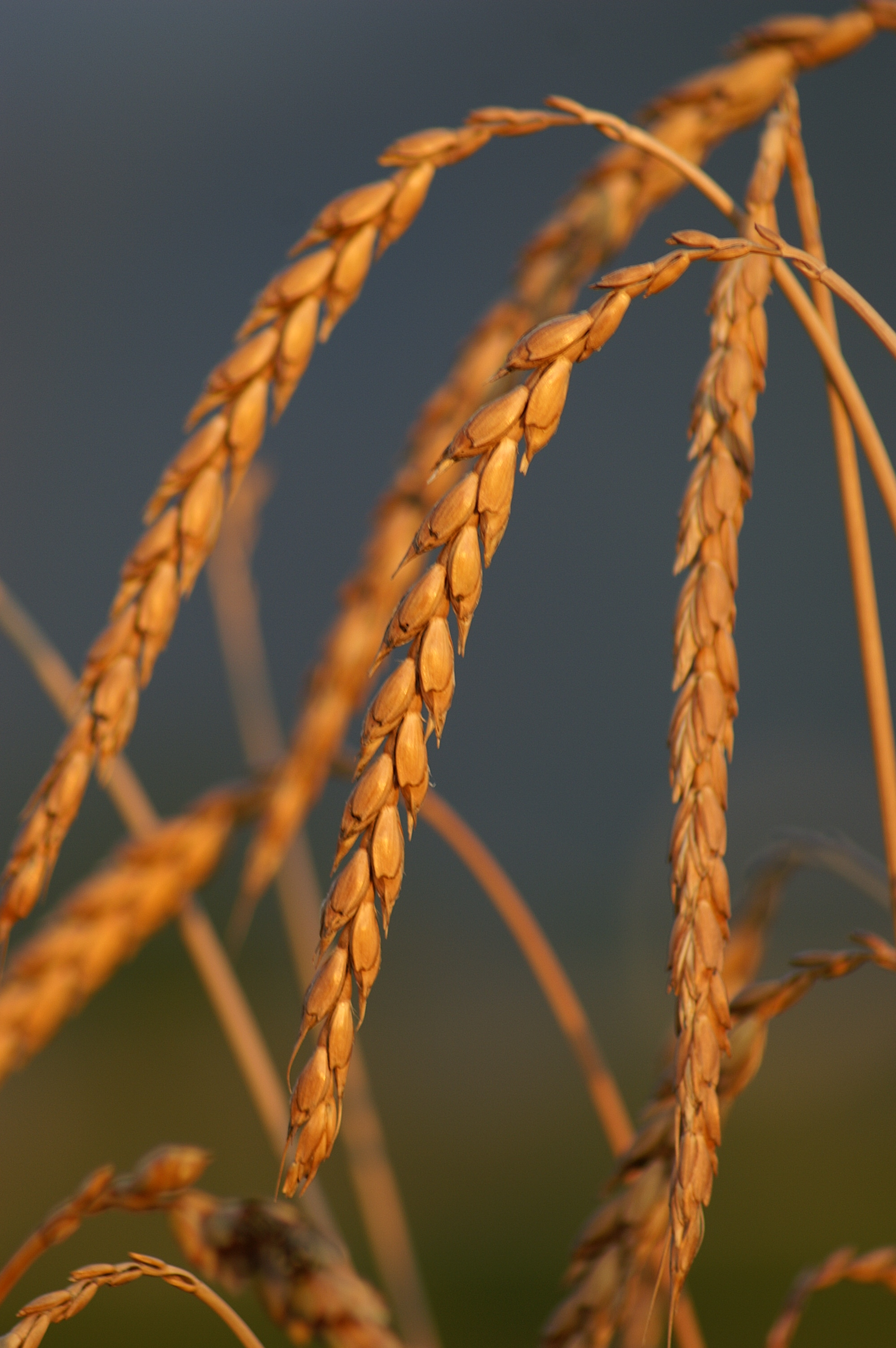 Dinkel (Triticum spelta oder Triticum aestivum ssp. spelta) oder „Spelz“ (auch: Spelt, Fesen, Vesen oder „Schwabenkorn“) ist eine Getreideart und ein enger Verwandter des heutigen Weizens.